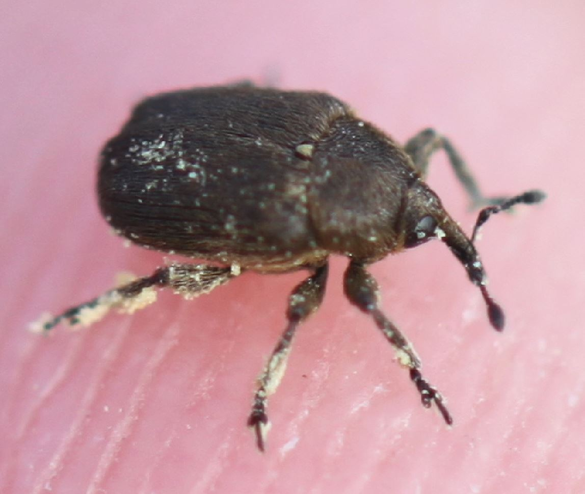 Rüsselkäfer Rhinusa neta am 9. November 2018 in Walldorf/Baden an Leinkraut